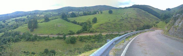 puerto del portillon a la altura de el mirador el posadorio